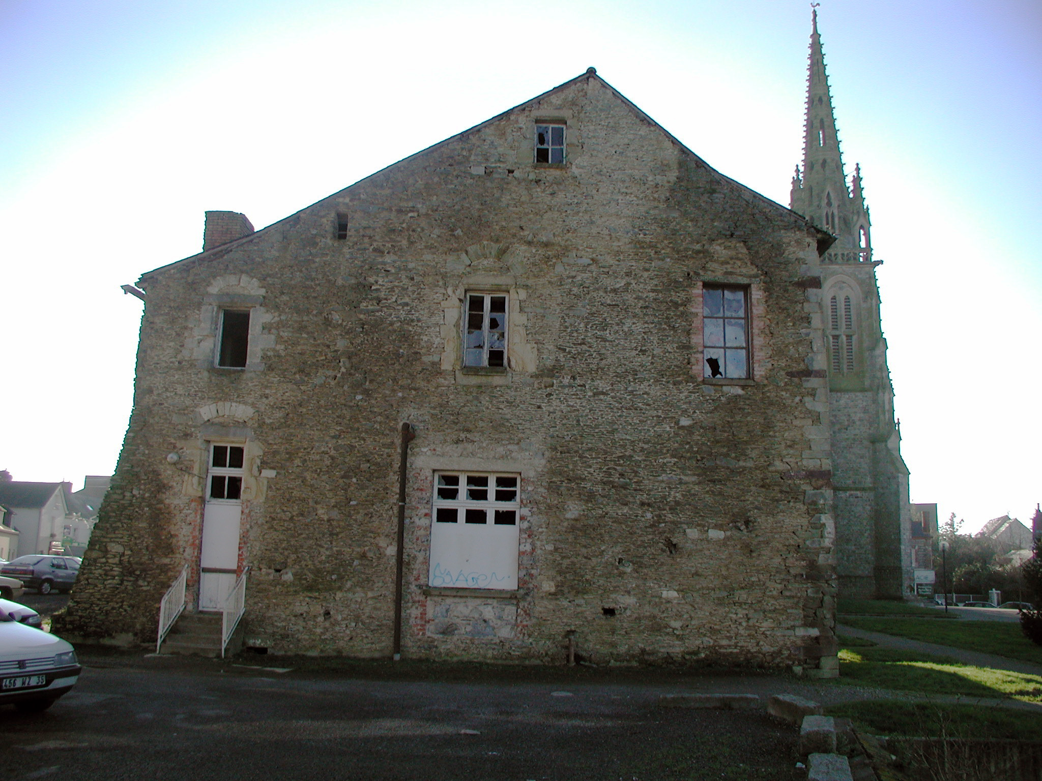 Description